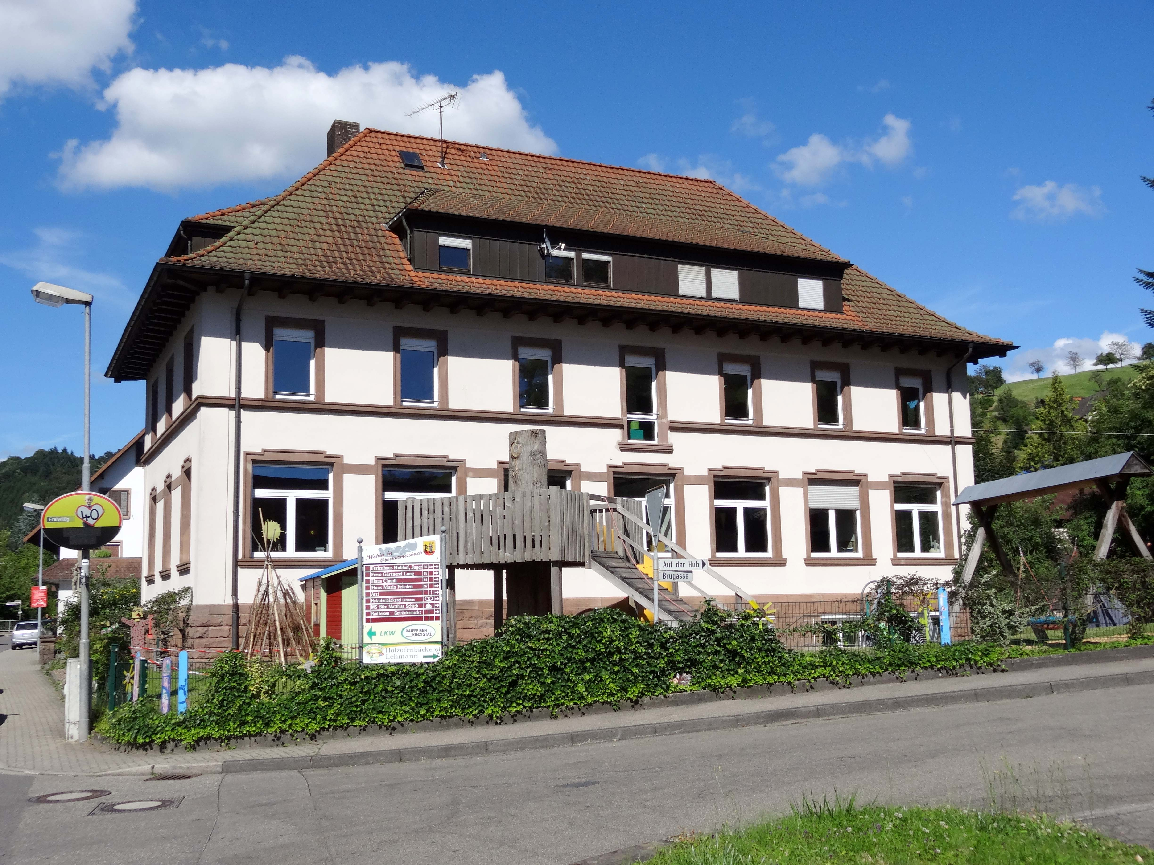 Oberharmersbach - siehe Bildtitel.